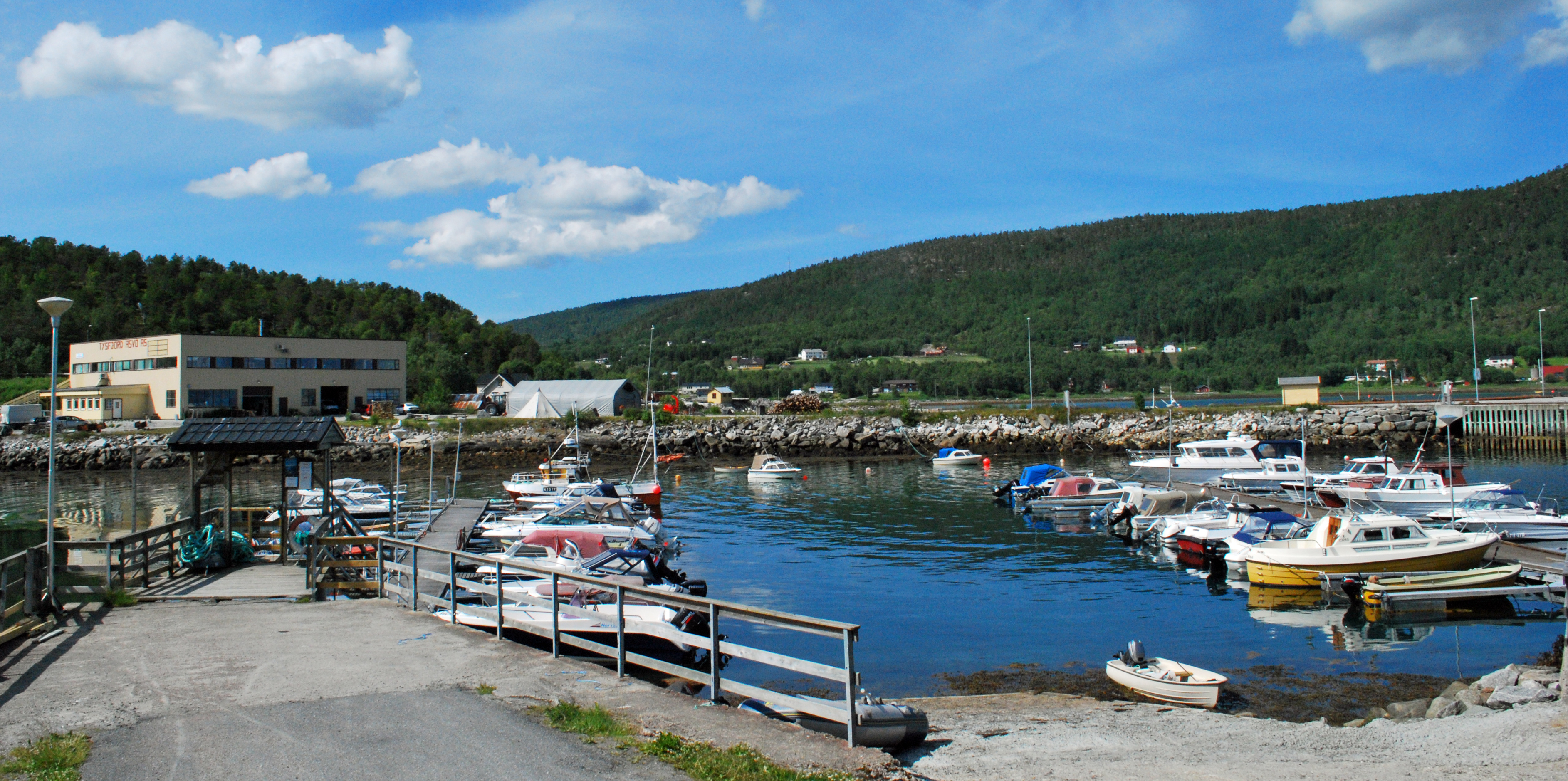 Drag småbåthavn, Tysfjord kommune